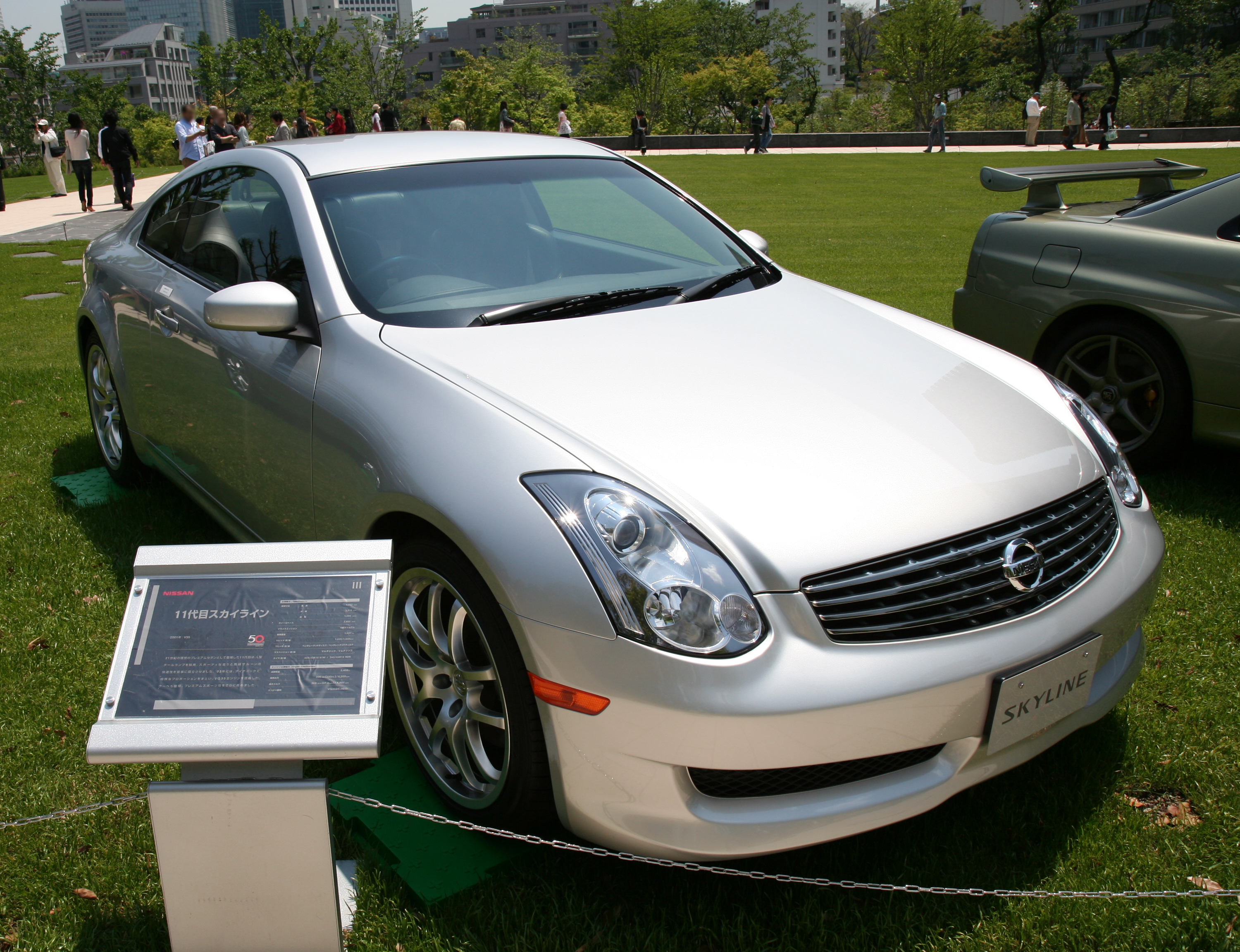 日産・スカイライン 11代目(V35系)。